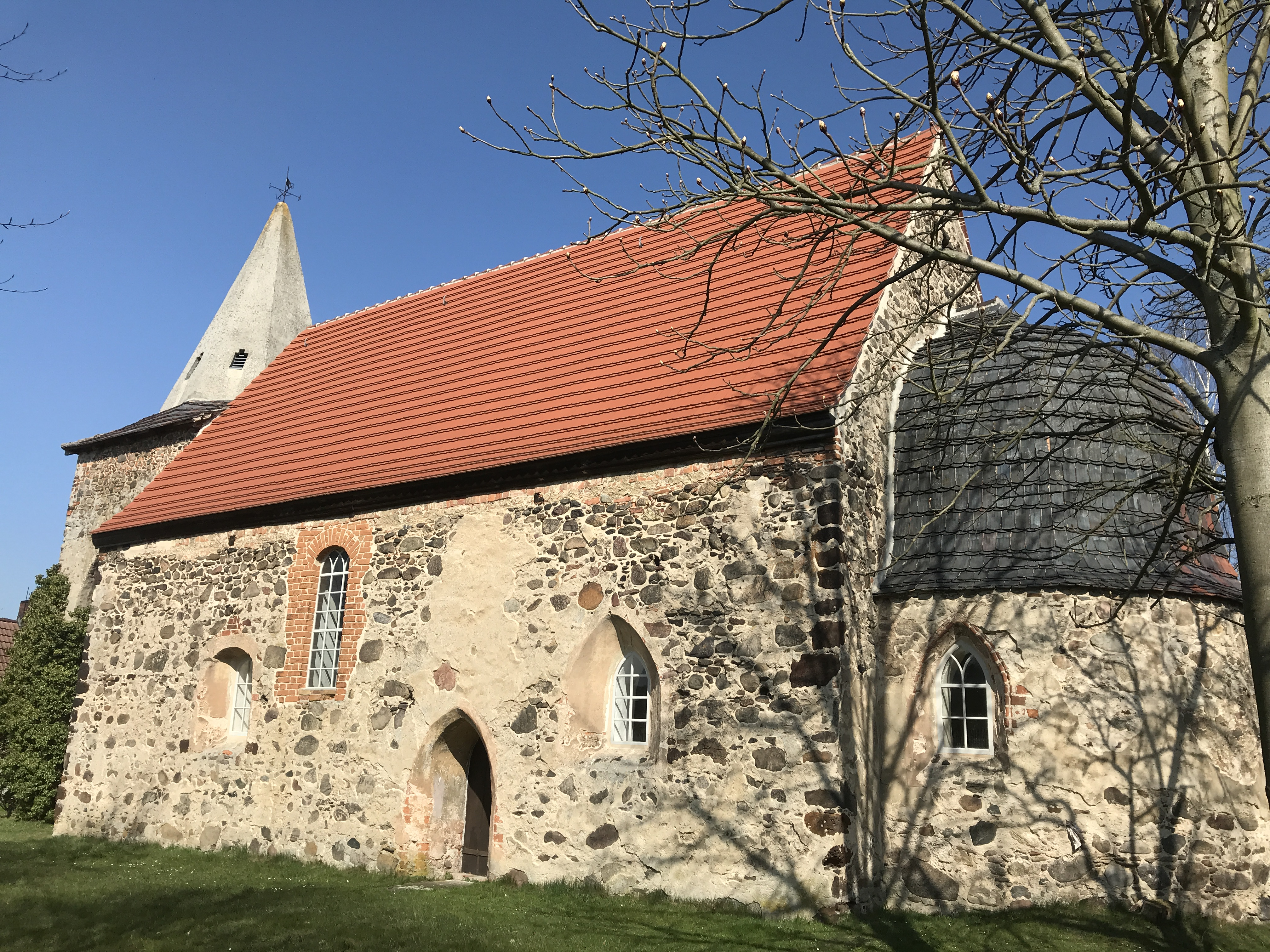 Die Dorfkirche Walddrehna ist eine mittelalterliche Feldsteinkirche, dessen Baugeschichte unter Experten umstritten ist.